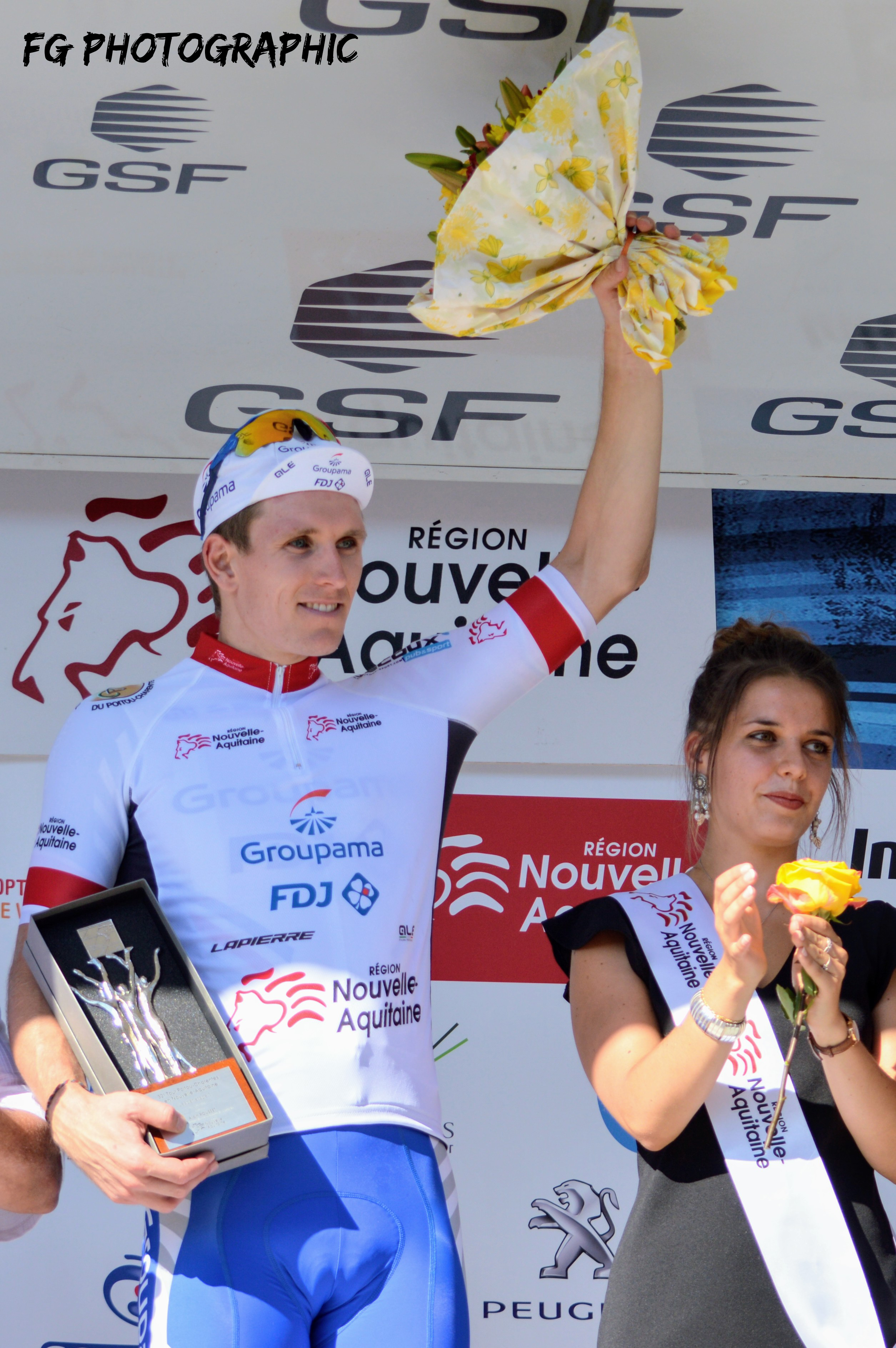 Arnaud DEMARE - Août 2018